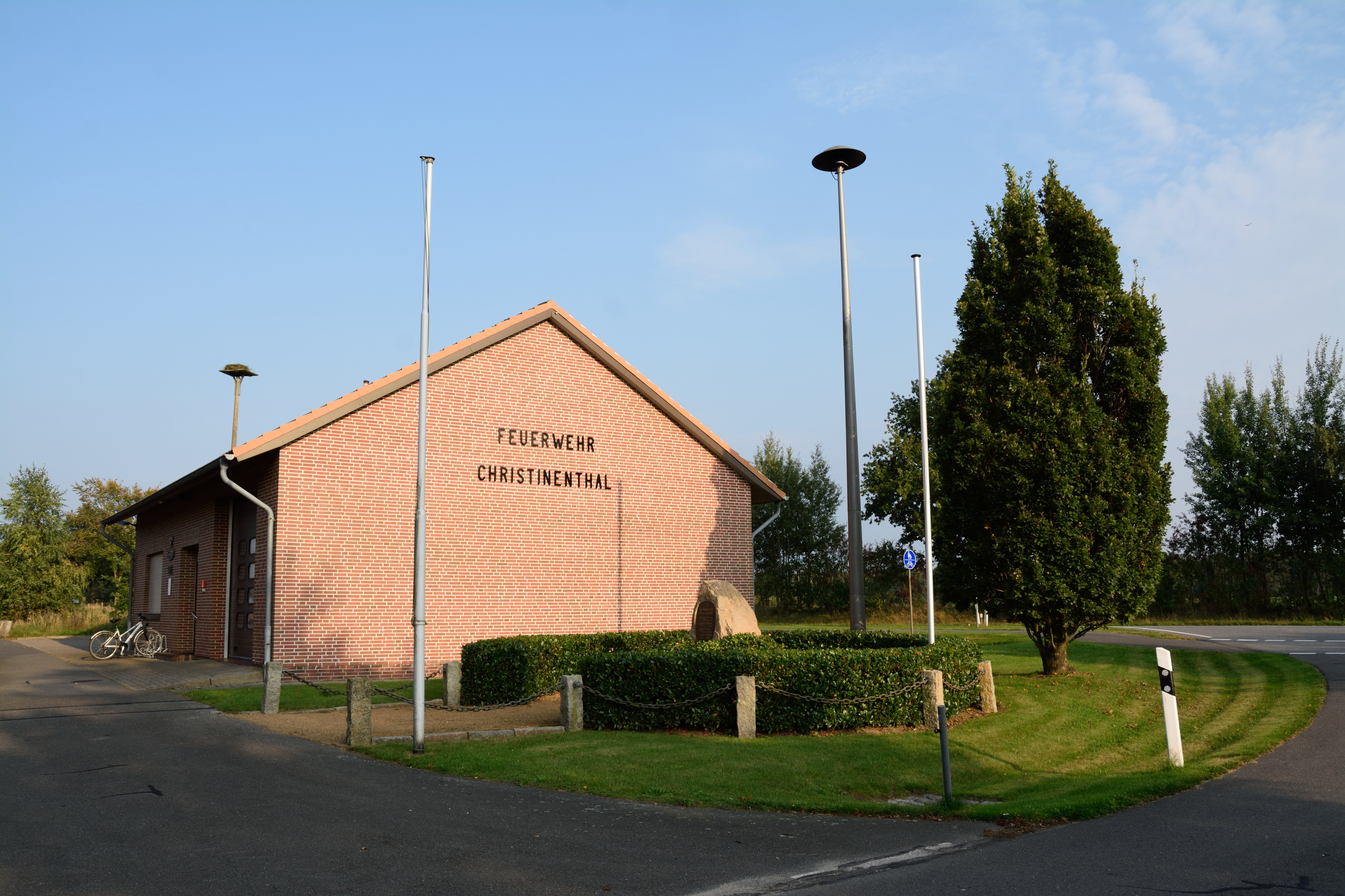 Ehrenmal in Christinenthal